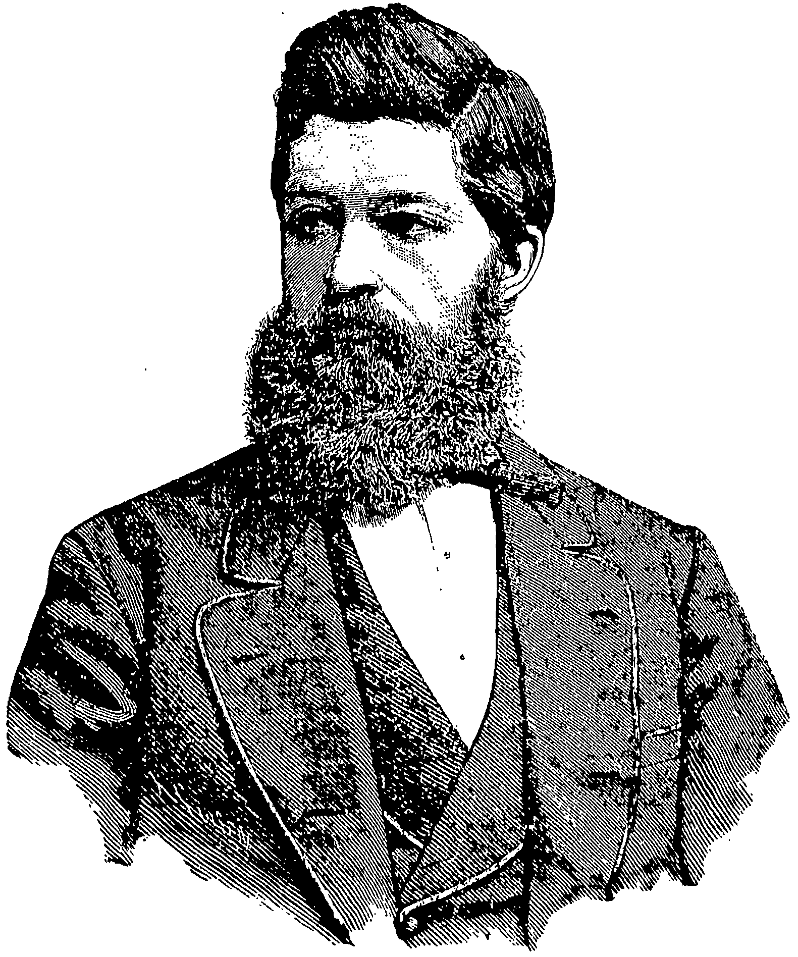 Den norske politikeren Jakob Sverdrup.